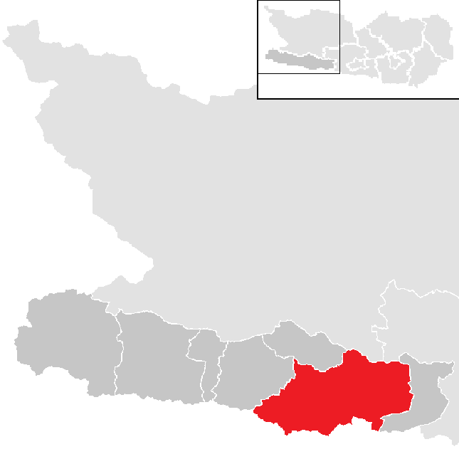 Bezirk Hermagor